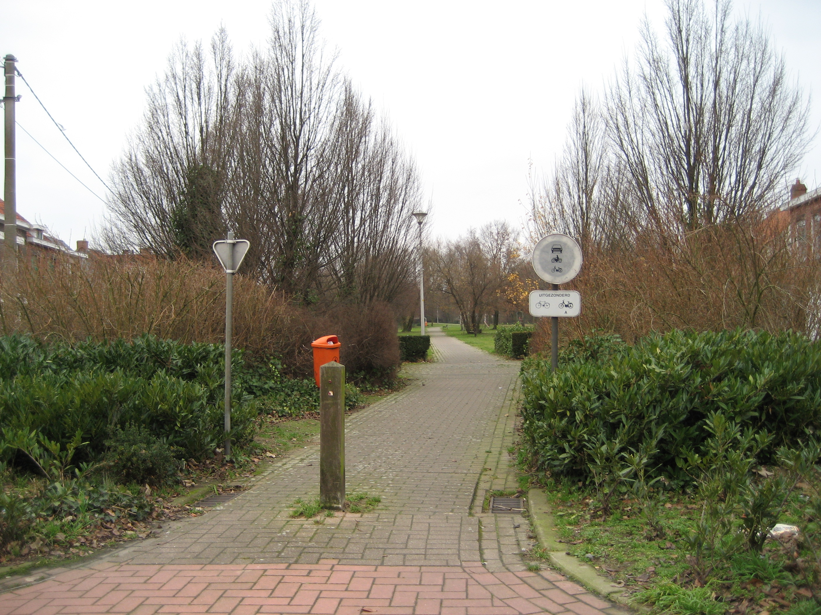 spoorfoto